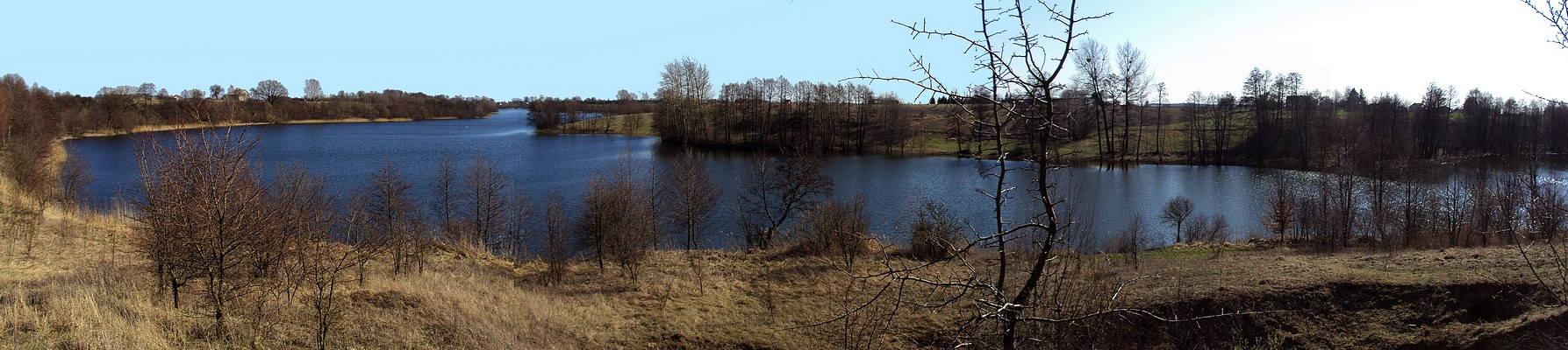 jezioro w woj. kujawsko-pomorskim, w powiecie rypińskim,polodowcowe, rynnowe z urozmaiconą linią brzegową, leżące na terenie Pojezierza Dobrzyńskiego